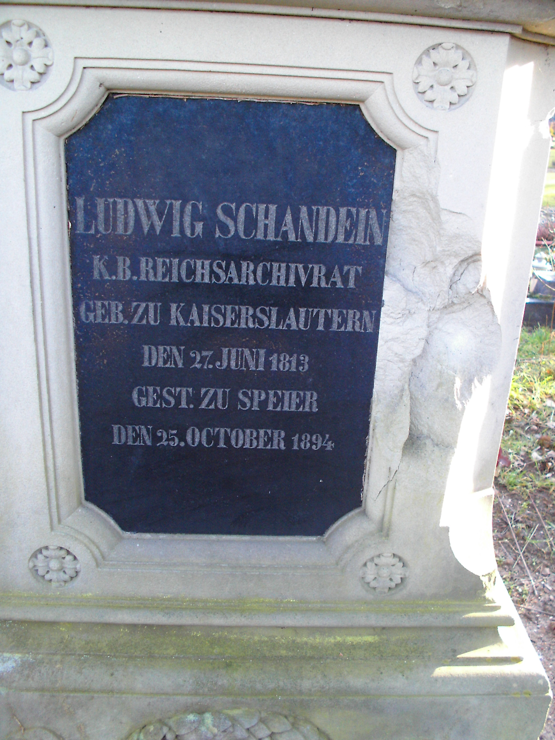 Ludwig Schandein, Historiker, Speyer, Grabinschrift